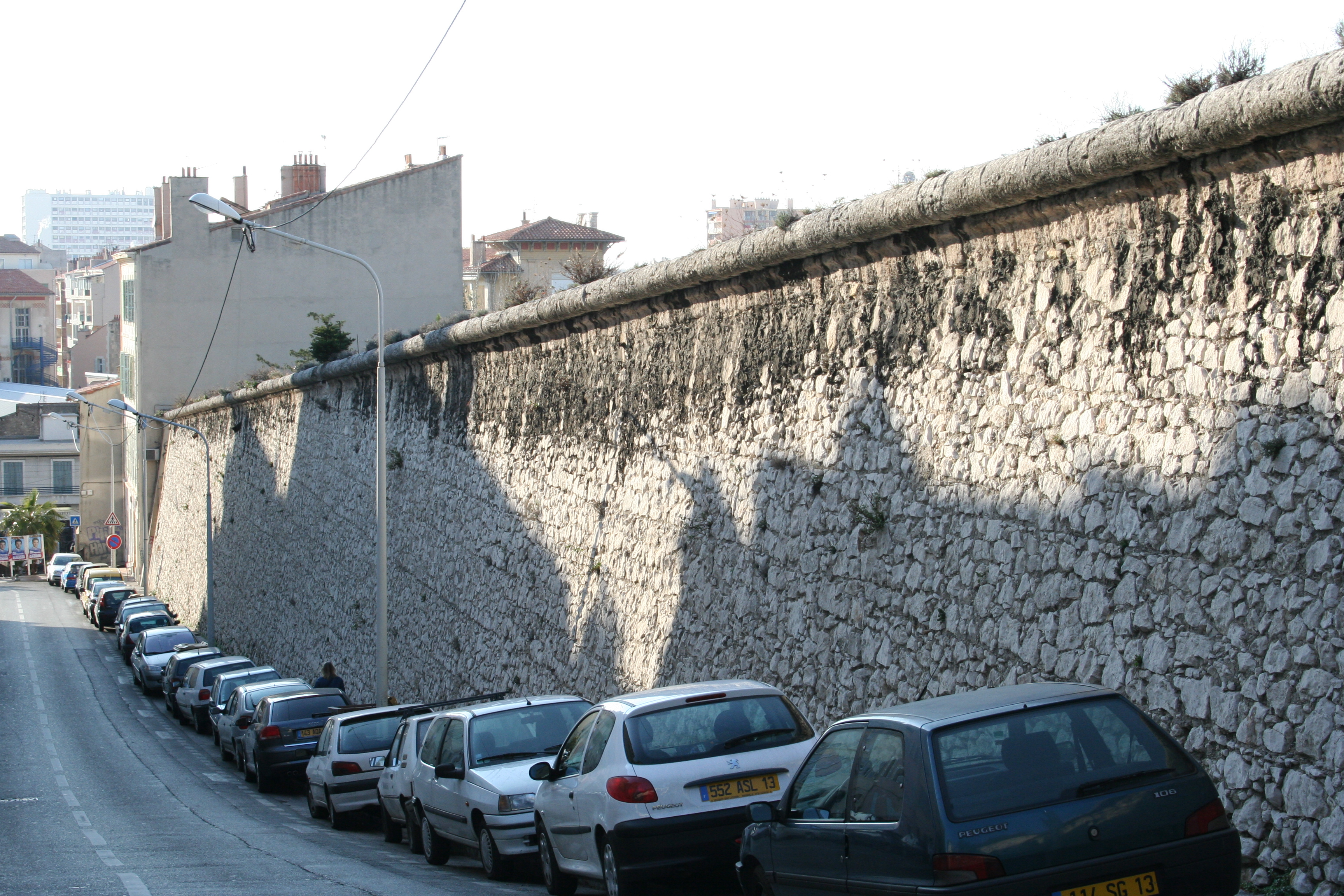 Vestige du rempart construit en 1660 sur ordre de Louis XIV, rue des Lices à Marseille (France).